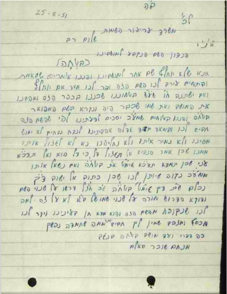 מכתב של ראש ועד בטחה לועדת השמות הממשלתית